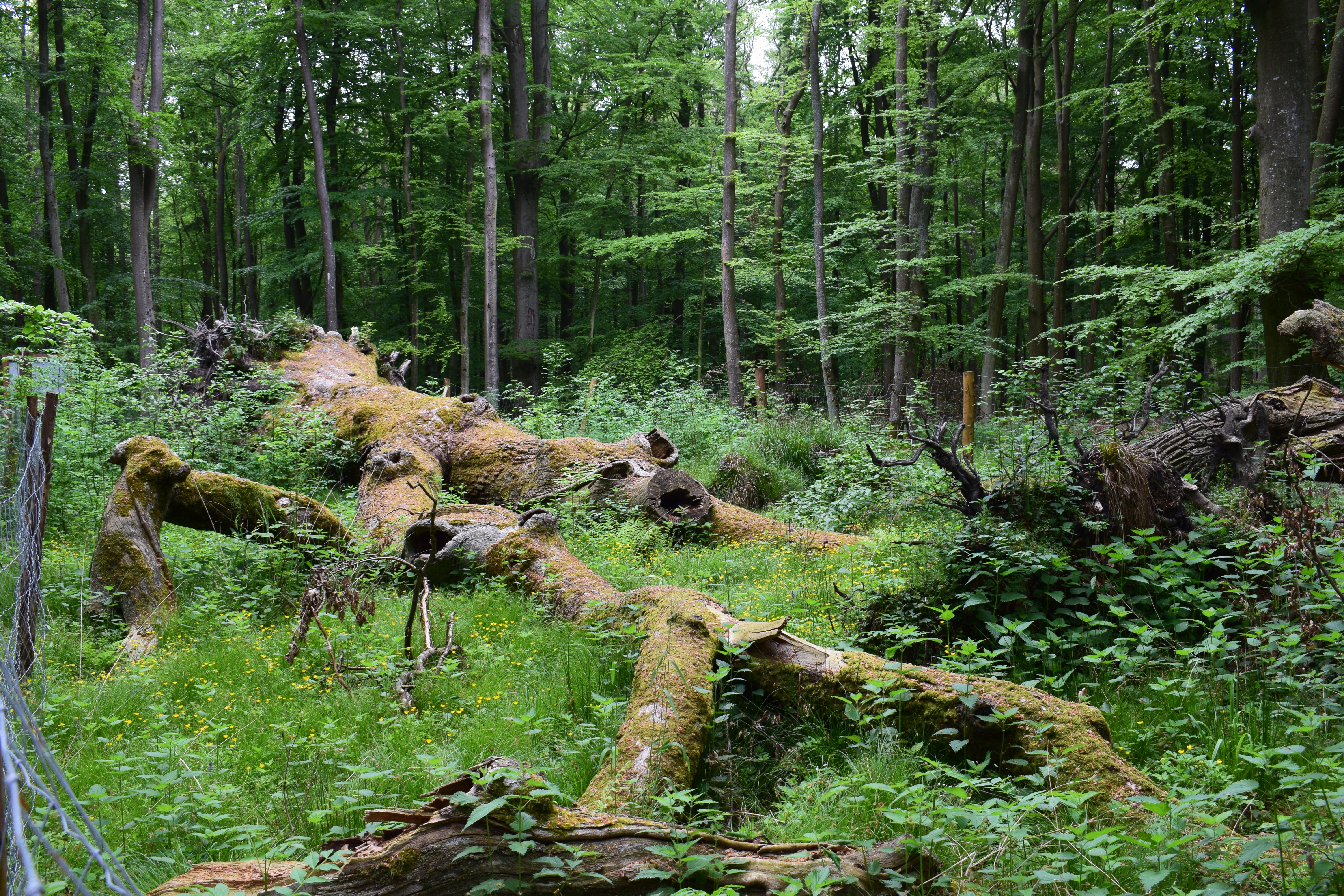 Die umgestürzte Bolesław-Eiche bei Kołobrzeg, einst älteste Eiche Polens, im Jahr 2017.